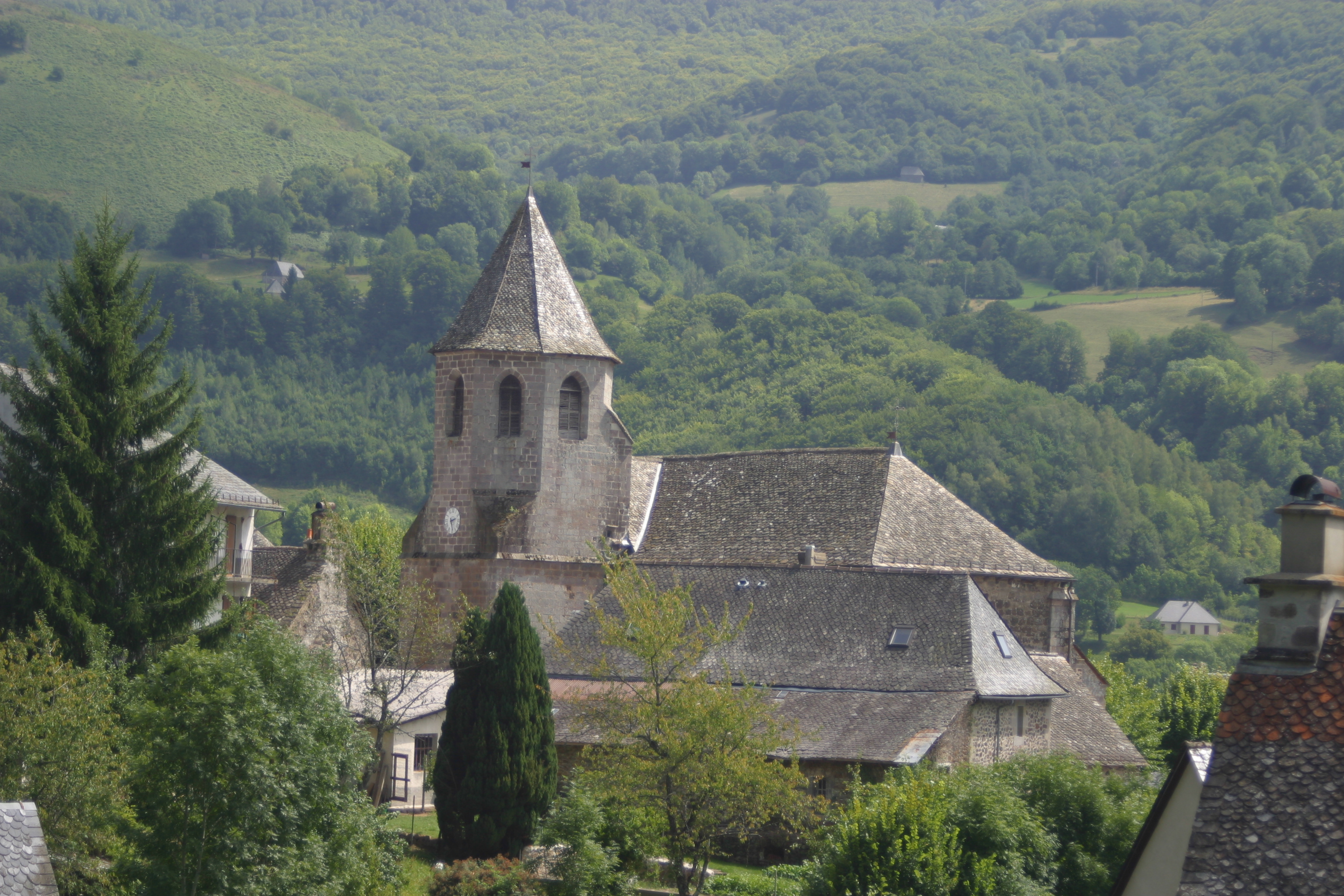 Église Saint-Martin .